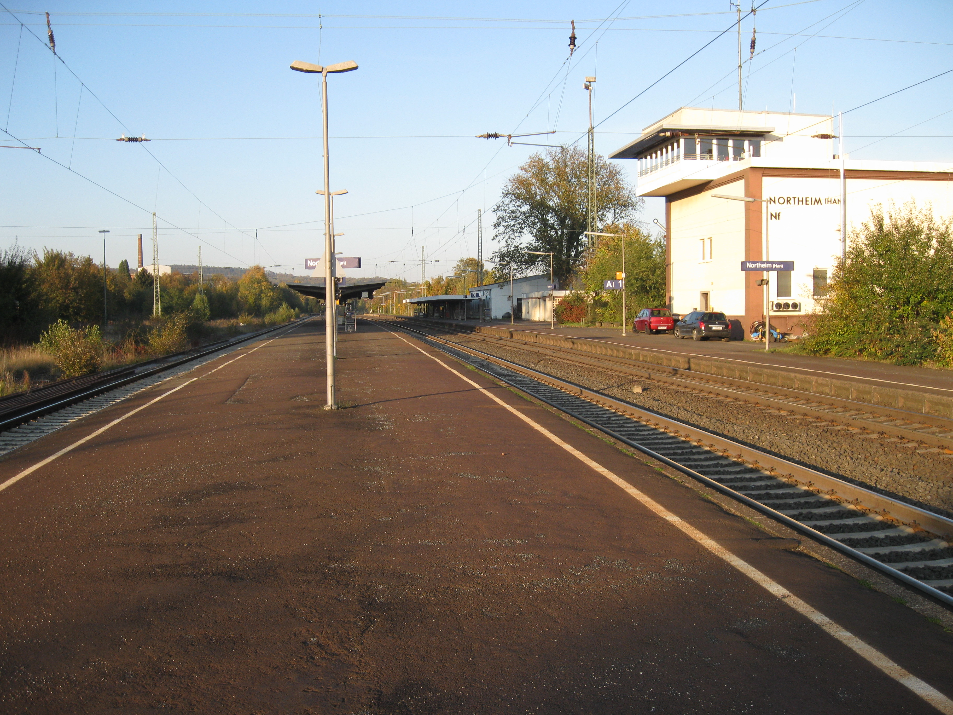 Northeim banegård, Tyskland